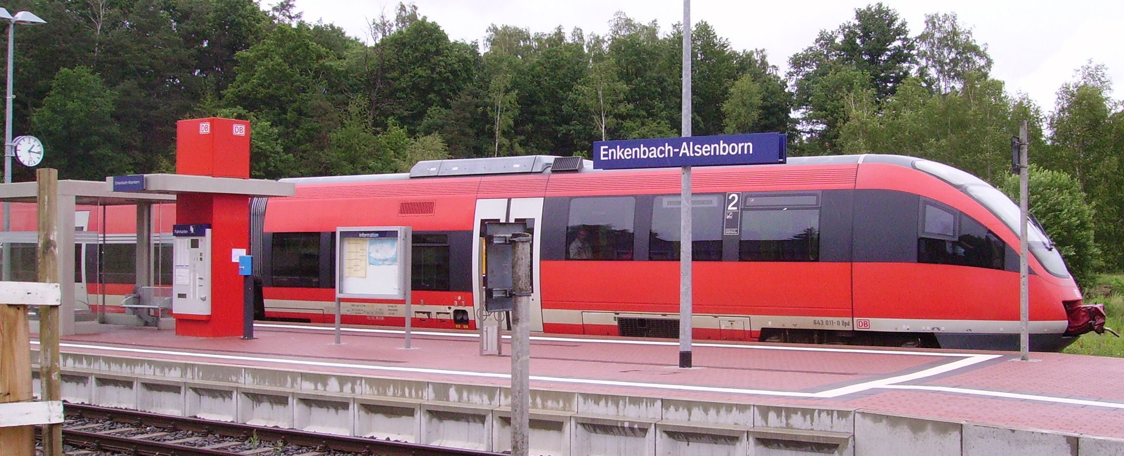 Bombardier Talent Baureihe 643 011-0 im Bahnhof Enkenbach-Alsenborn, Germany